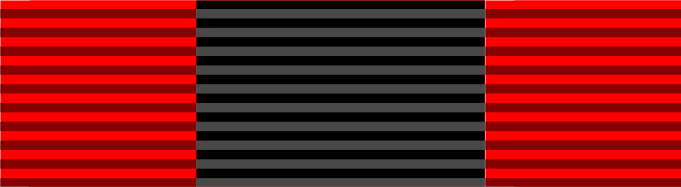 Nastro dell'ordine del giogo e delle frecce (Spagna)